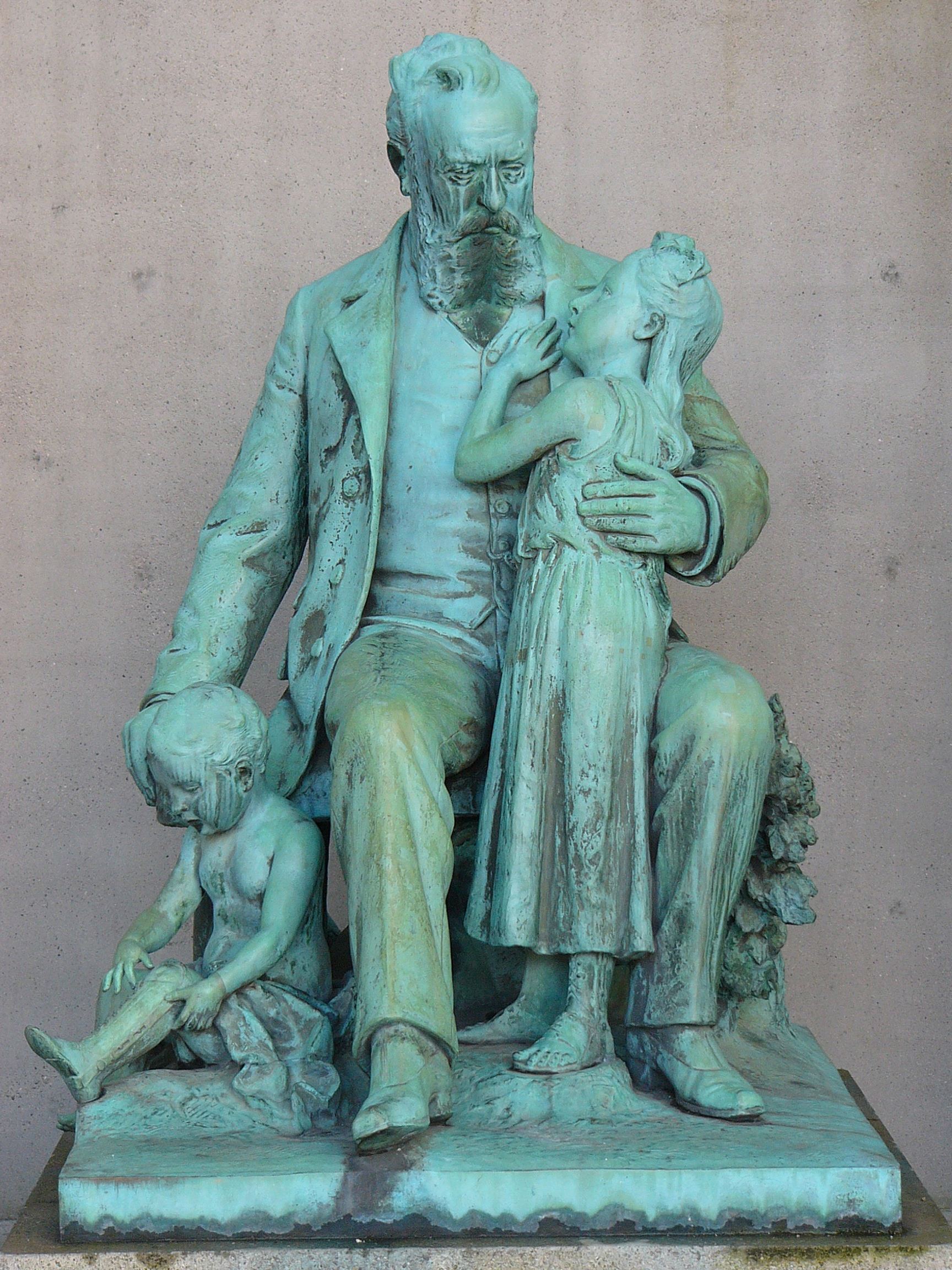 Denkmal des Hofrats Friedrich von Hessing, Bronzeguss, von Eugen Boermel, 1908.This is a photograph of an architectural monument.